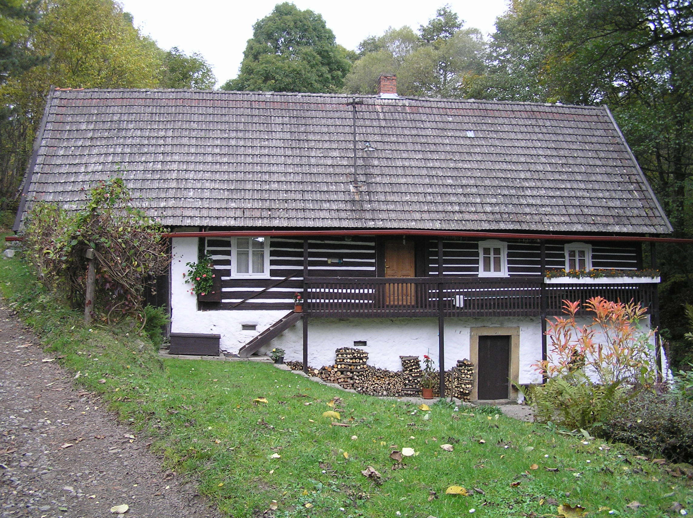 Bystrá - lidová architektura